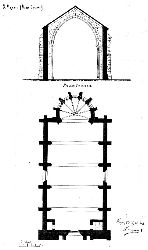 Iglesia de Noya, planta y sección.jpg